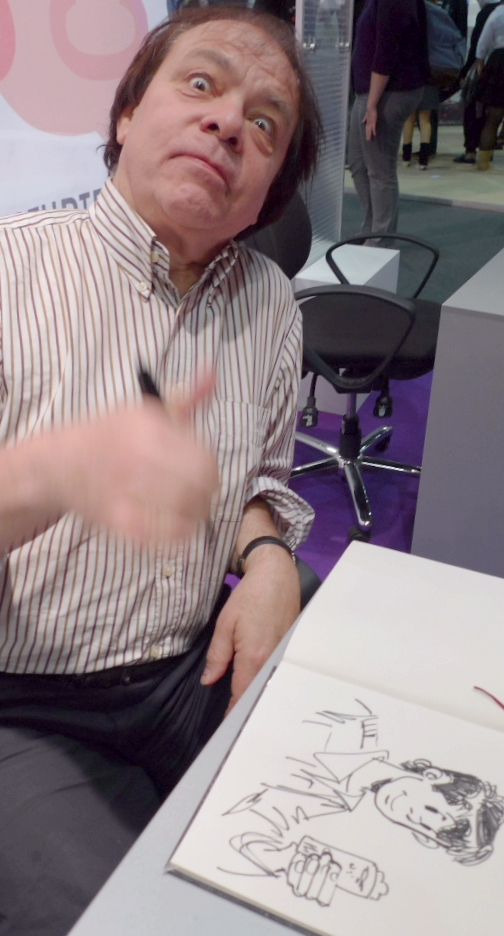 François Walthéry (2010)